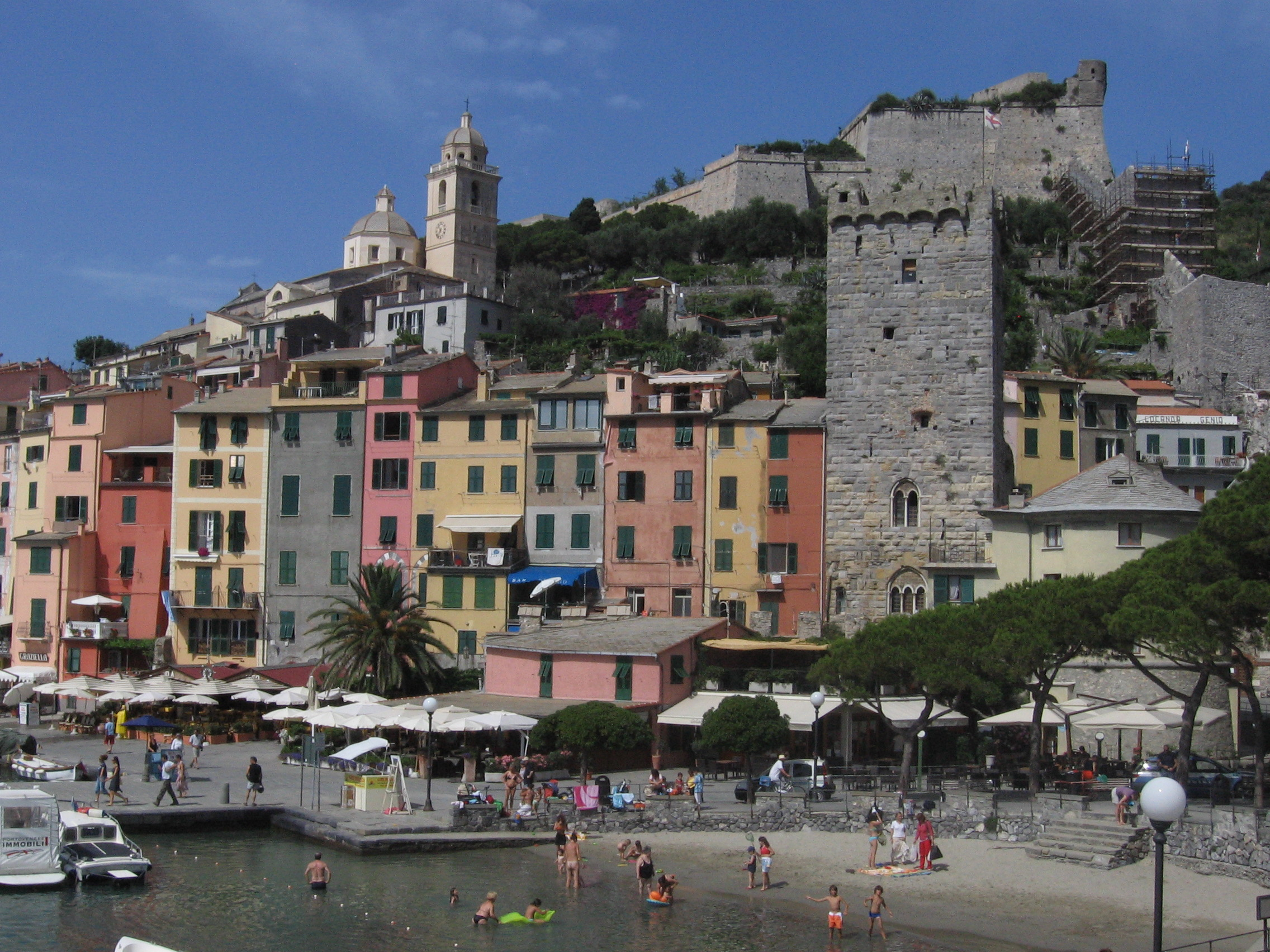 Portovenere